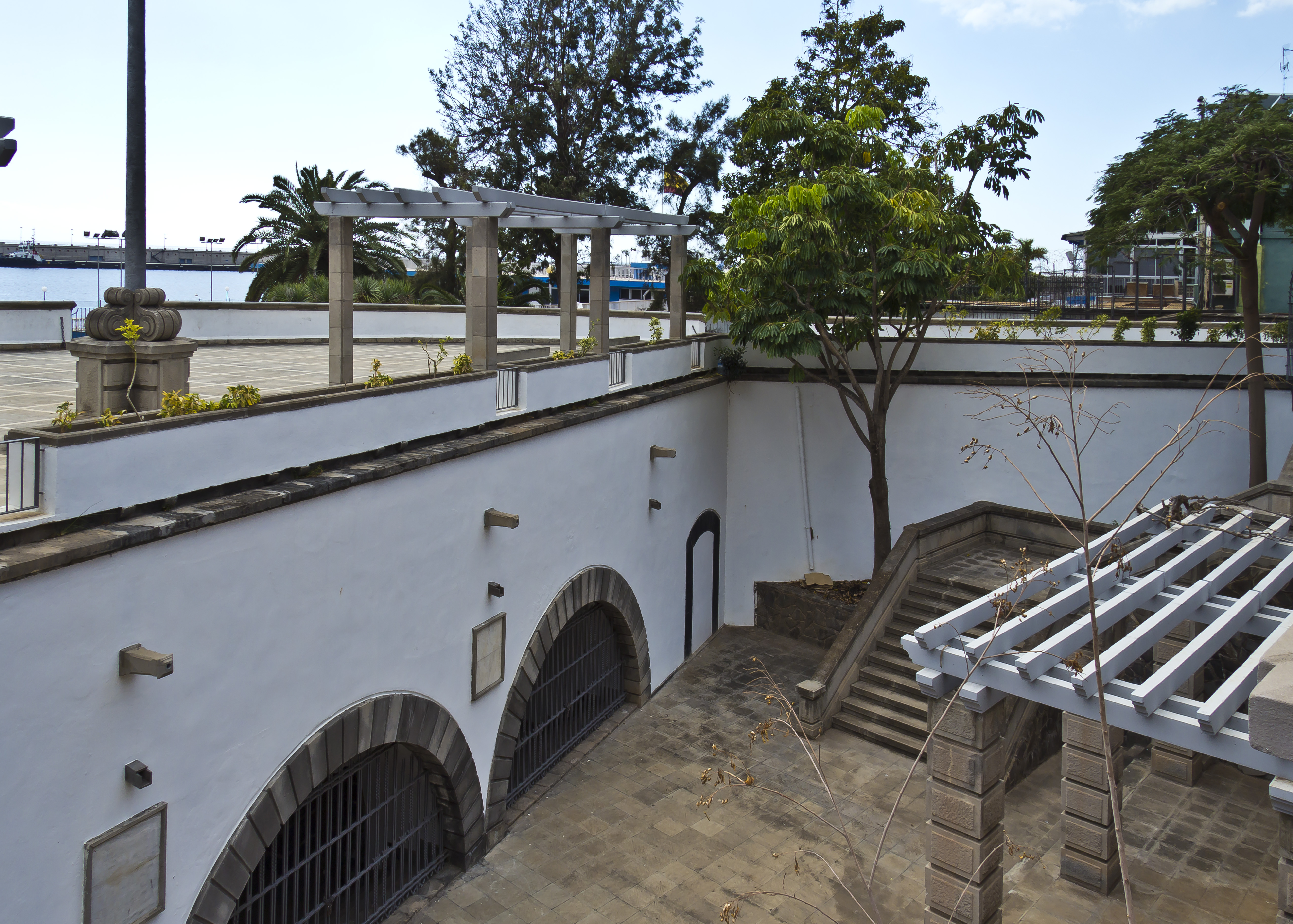 Die Befestigung Paso Alto in Santa Cruz de Tenerife